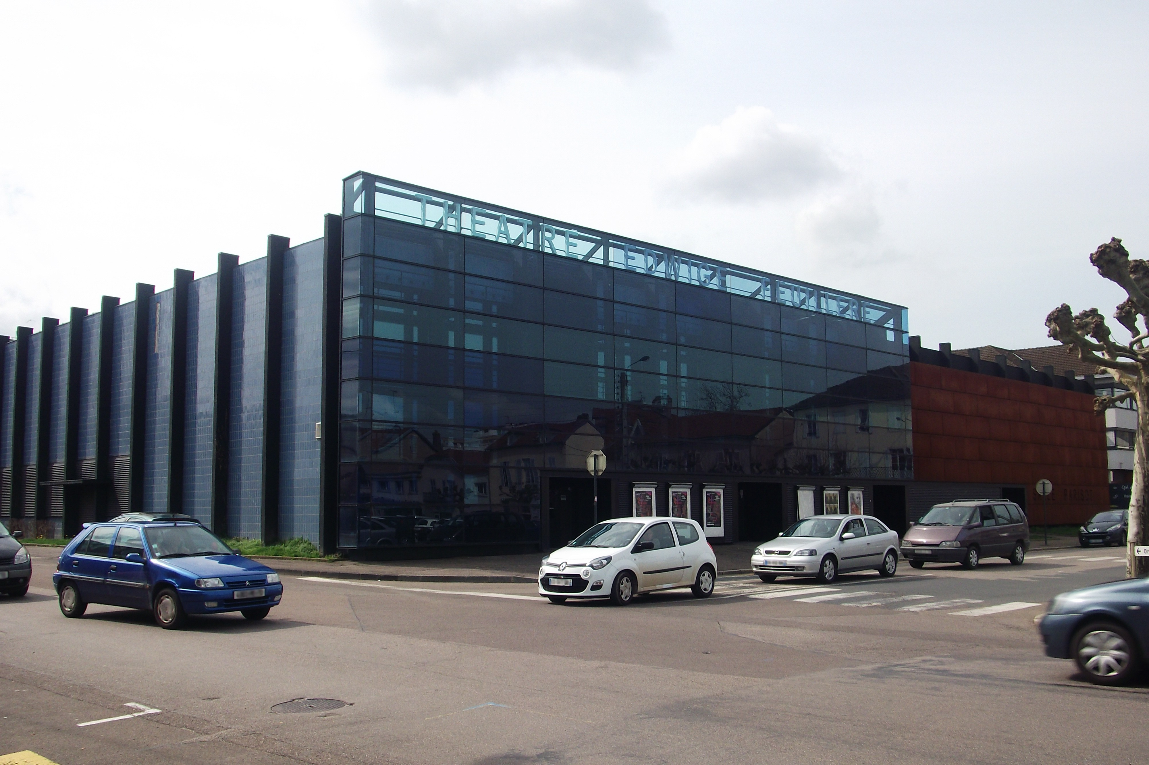 Le théâtre Edwige Feuillère de Vesoul (Haute-Saône, Franche-Comté)